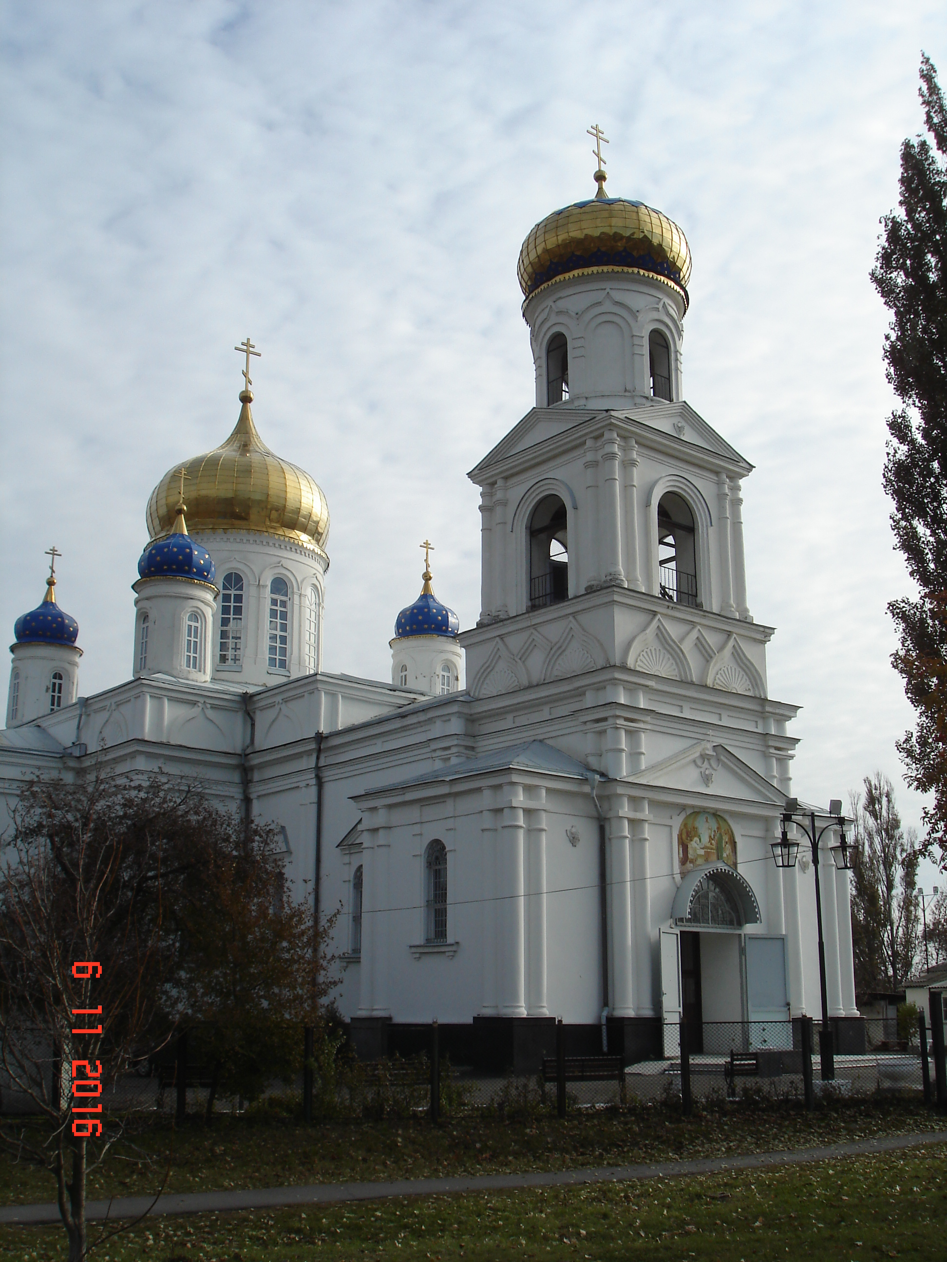 Гундоровка, храм Успения Пресвятой Богородицы